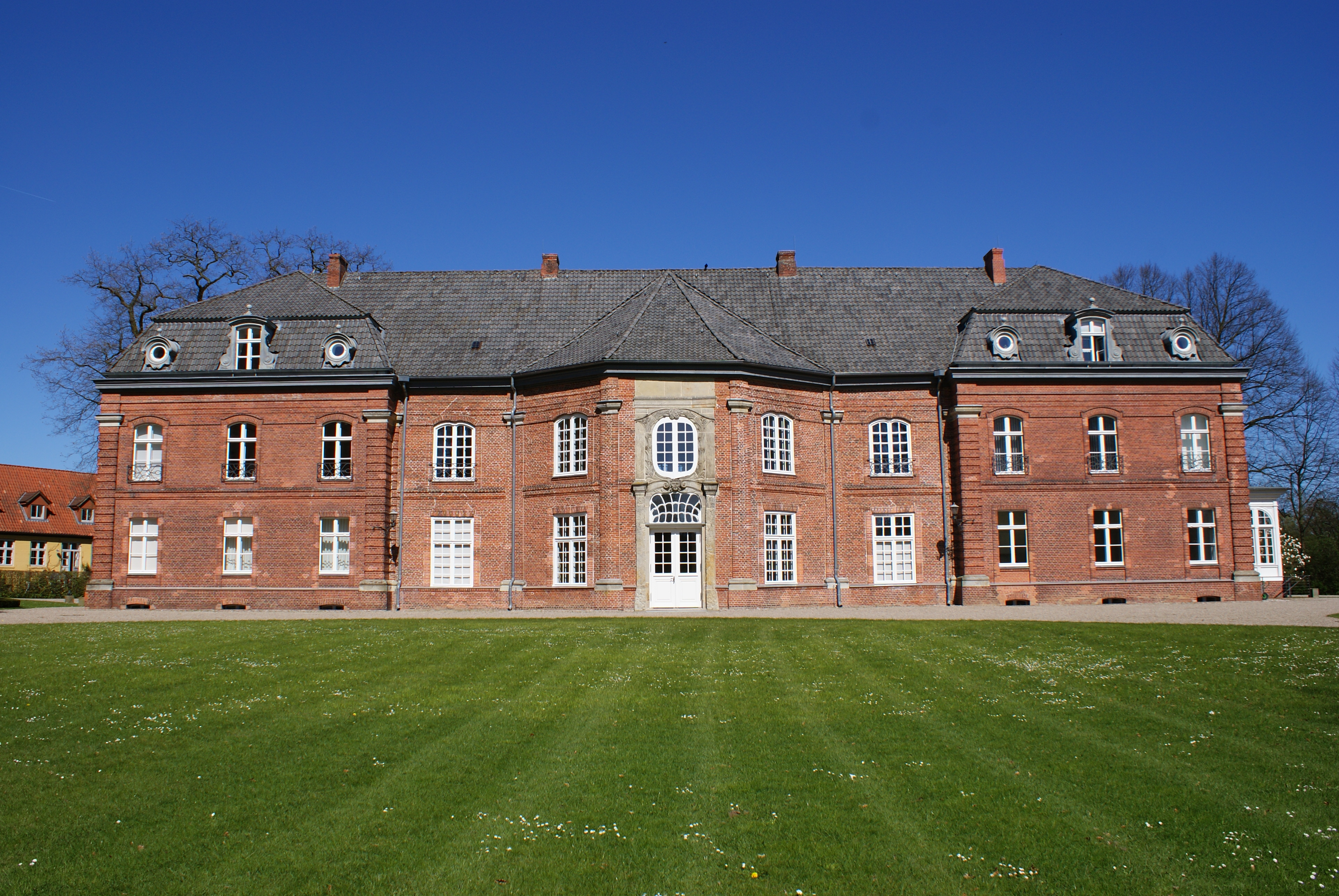 Plön Prinzenhaus